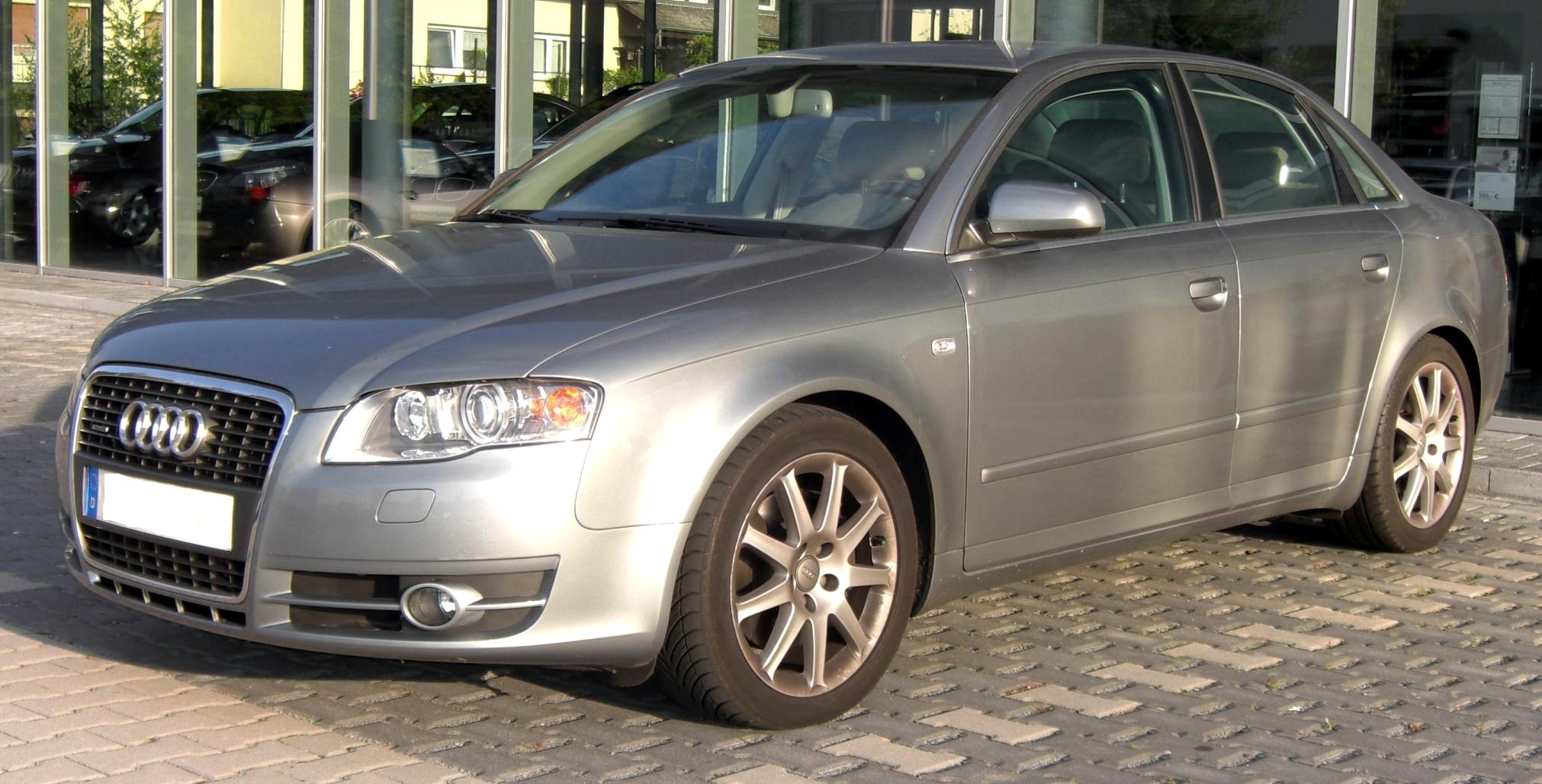 Audi A4 B7